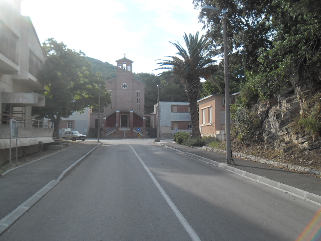 otok Lastovo